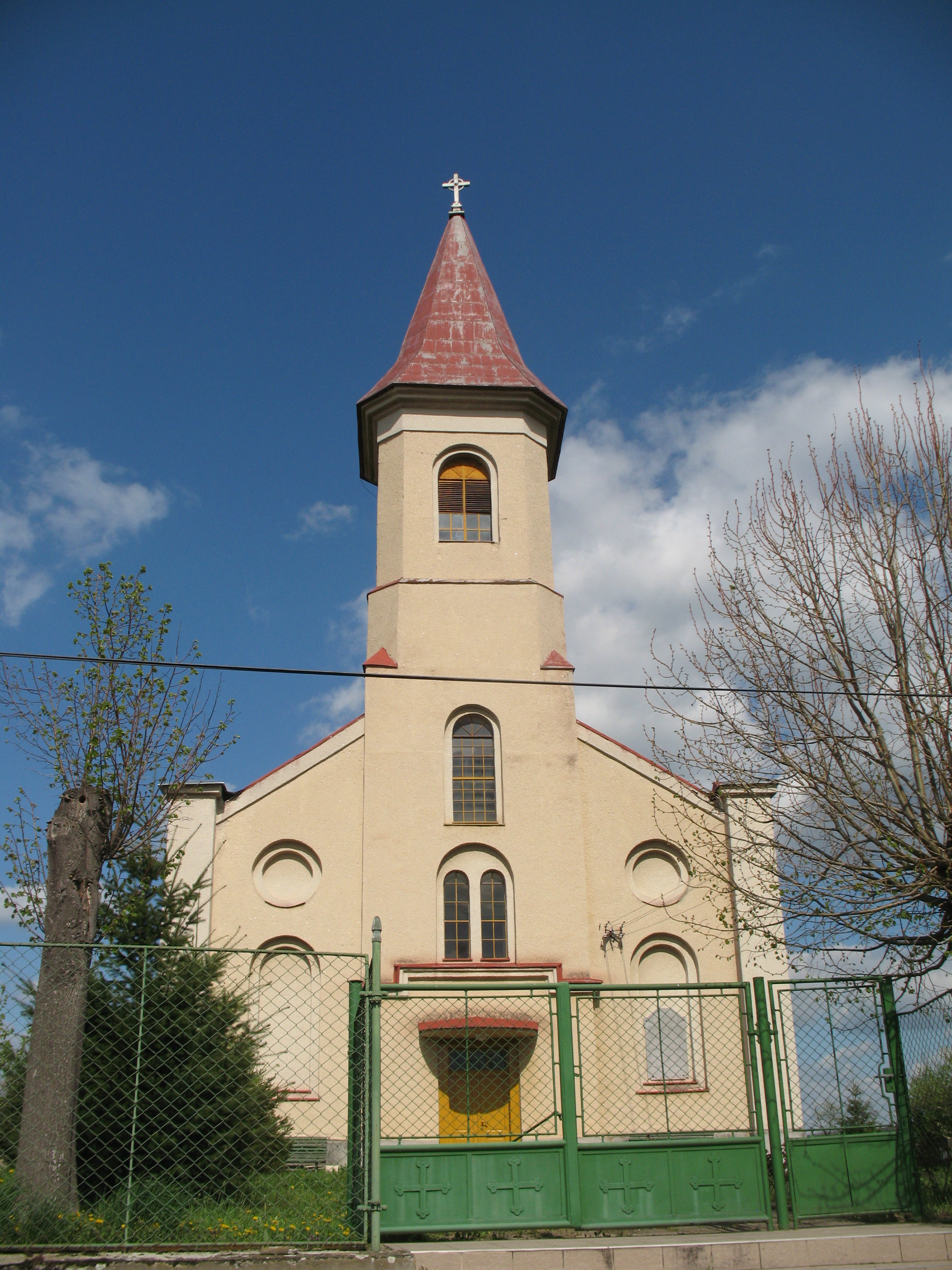 Terény